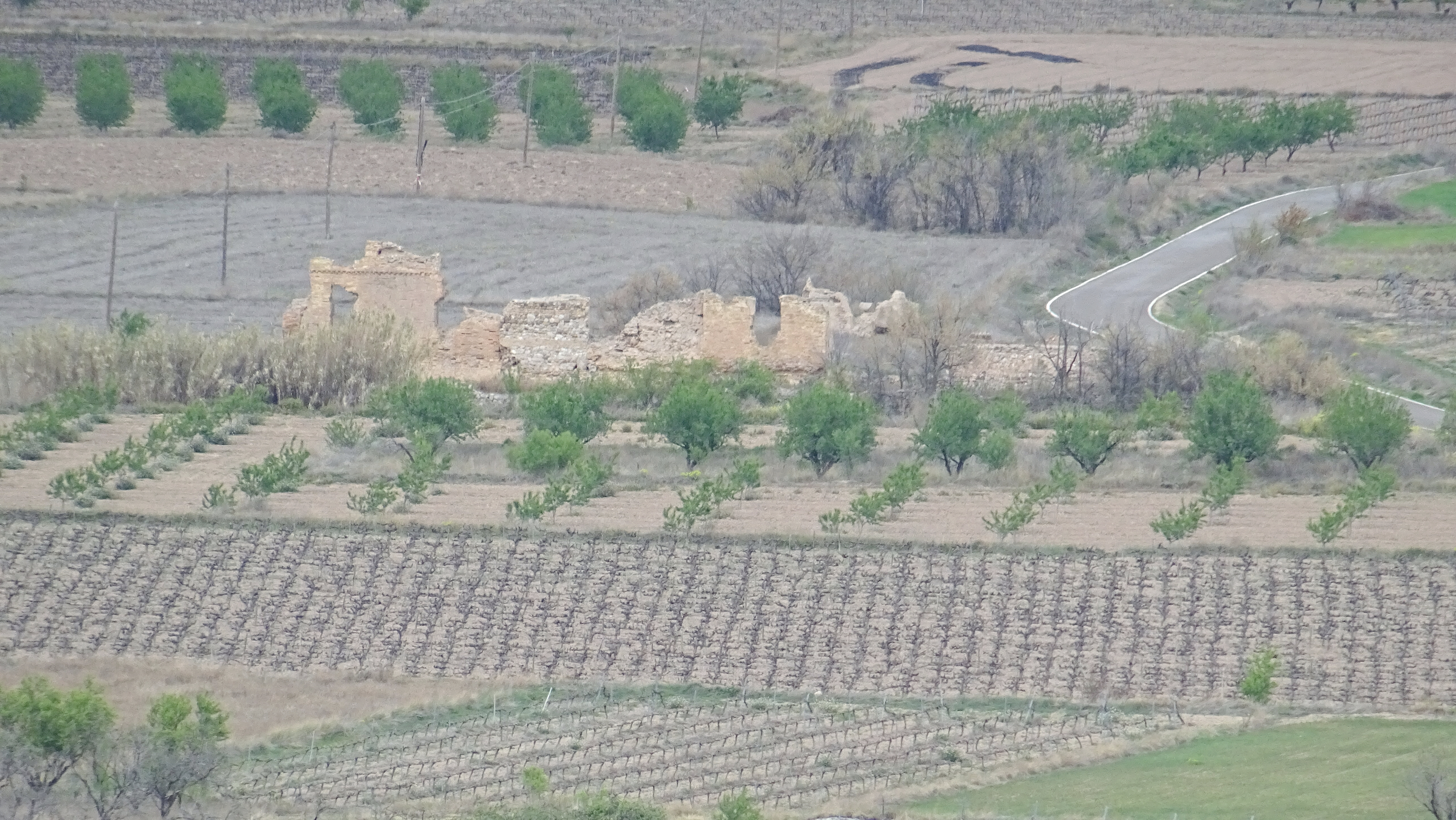 Aragonés: grancha de Mazalcoraz vista dende La Molilla, Magallón